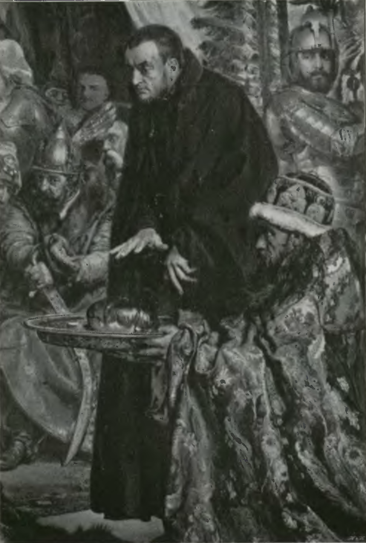 grafika z albumu PL Stanisław Witkiewicz - 'Matejko'